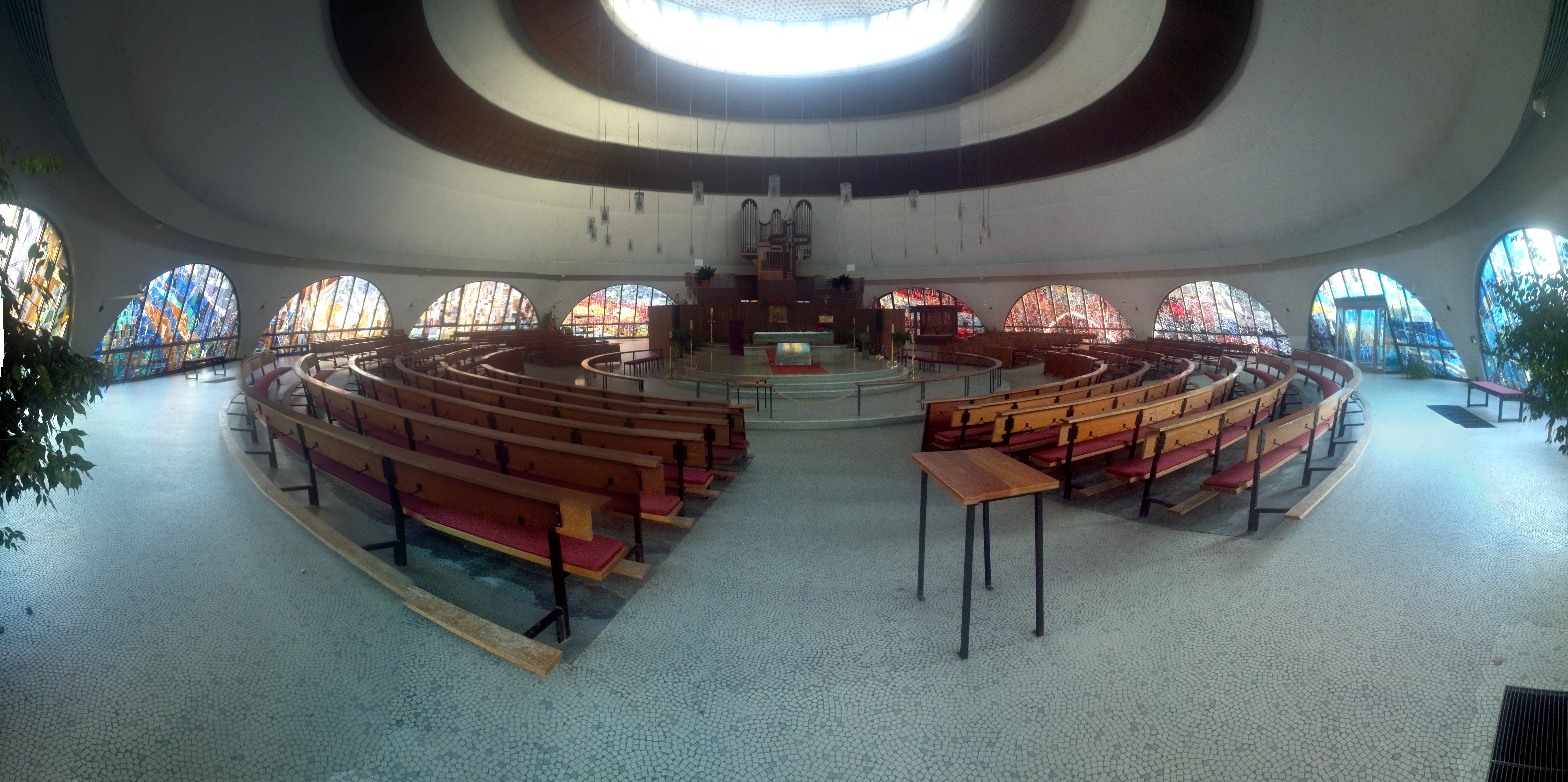 St. Fronleichnam Homburg innen